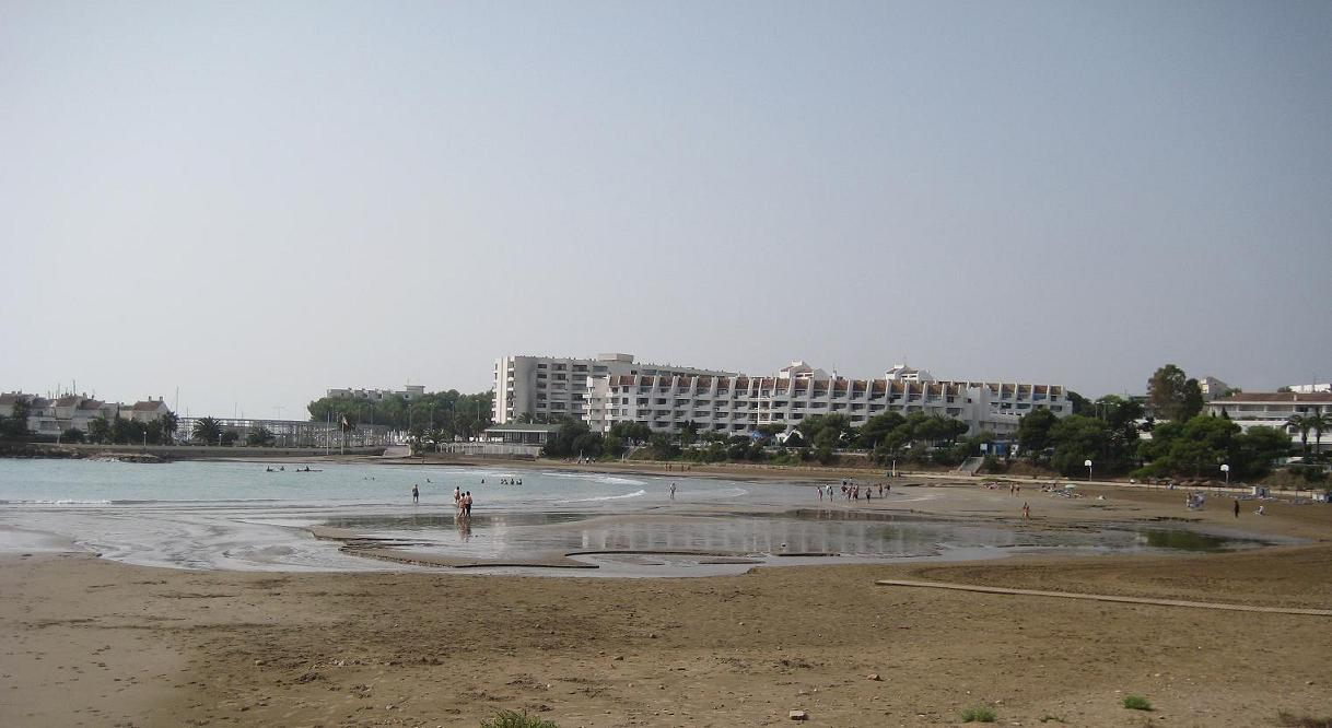 Platja de Les Fonts a Les Fonts en el municipi d'Alcalà de Xivert